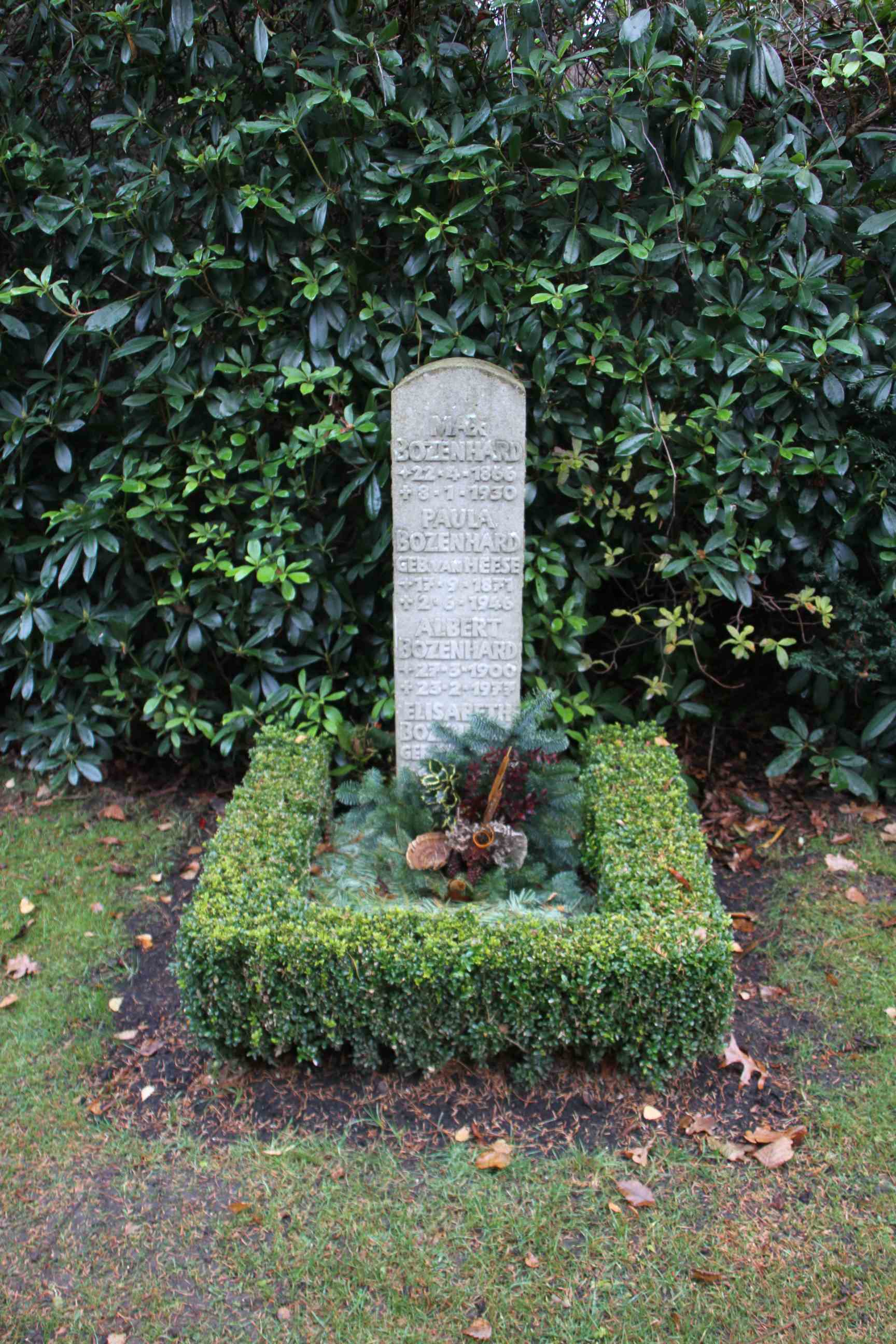 Albert Bozenhard (* 14. Februar 1860 in Ulm; † 13. Januar 1939 in Stuttgart) war ein deutscher Schauspieler und Operettensänger (Bariton).